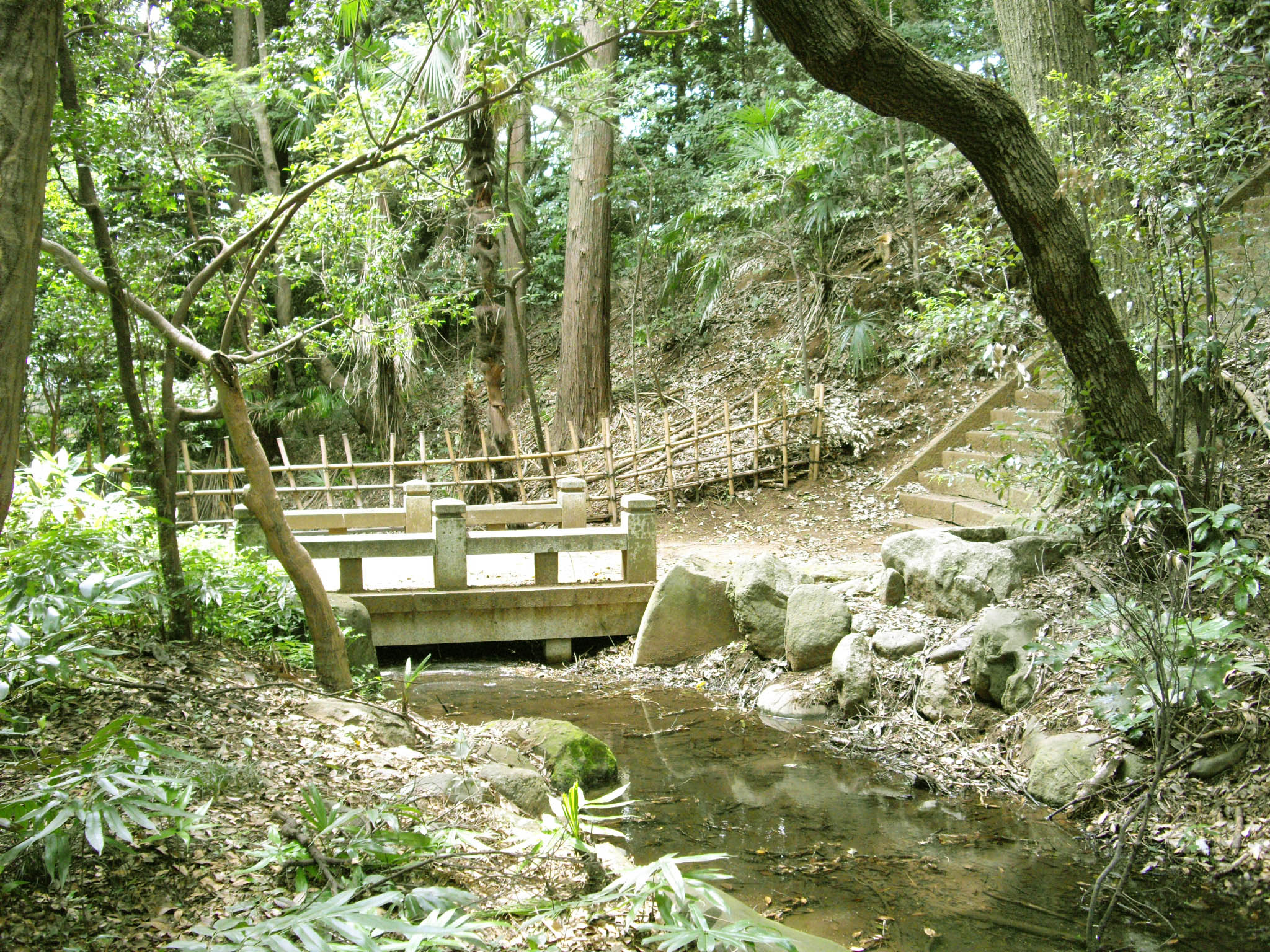 世田谷区立静嘉堂緑地